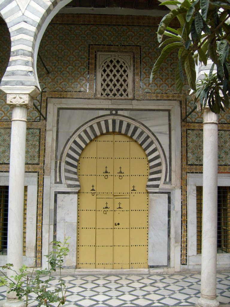 Porte dans la cour du Dar Othman dans la médina de Tunis (Tunisie)